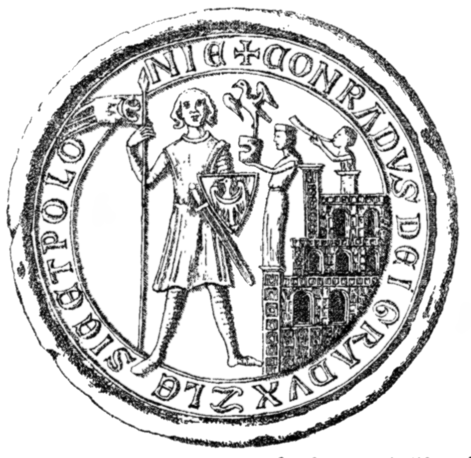 Konrad I Głogowski seal